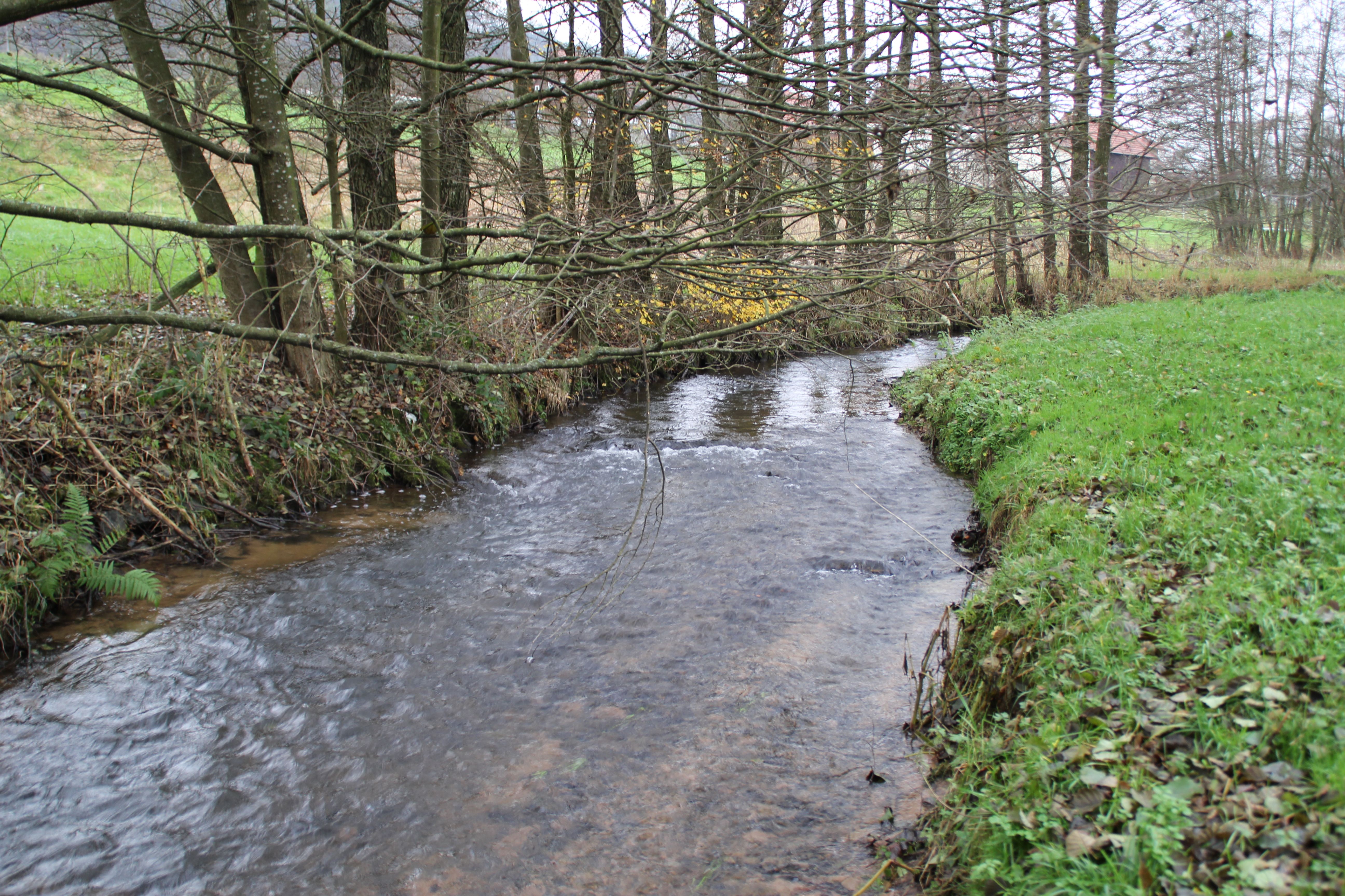 Der Mossaubach bei Unter-Mossau